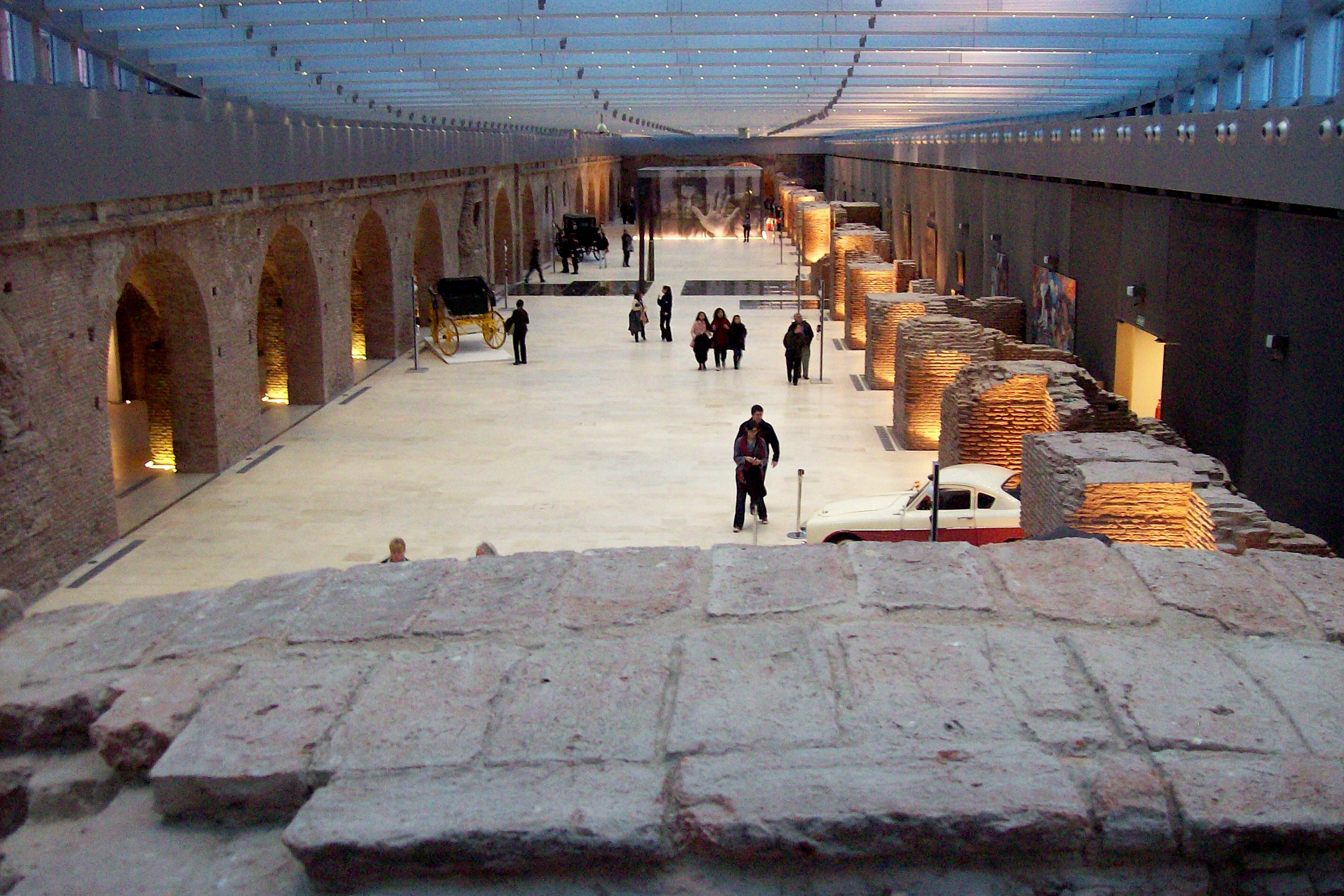 Vista desde la entrada al Museo del Bicentenario, en la Casa Rosada, Buenos Aires, Argentina.